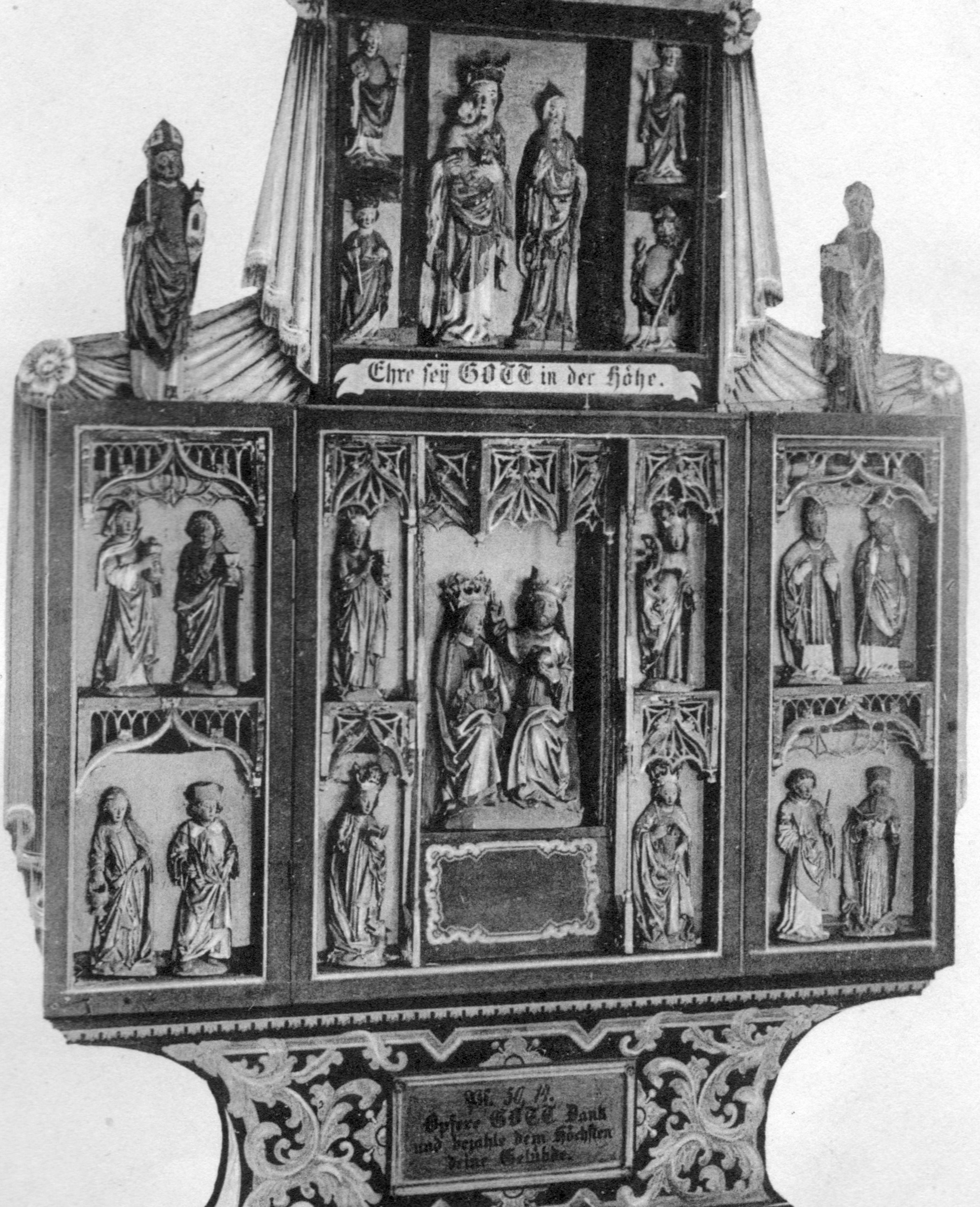 Altarbild der Kirche in Würdenhain